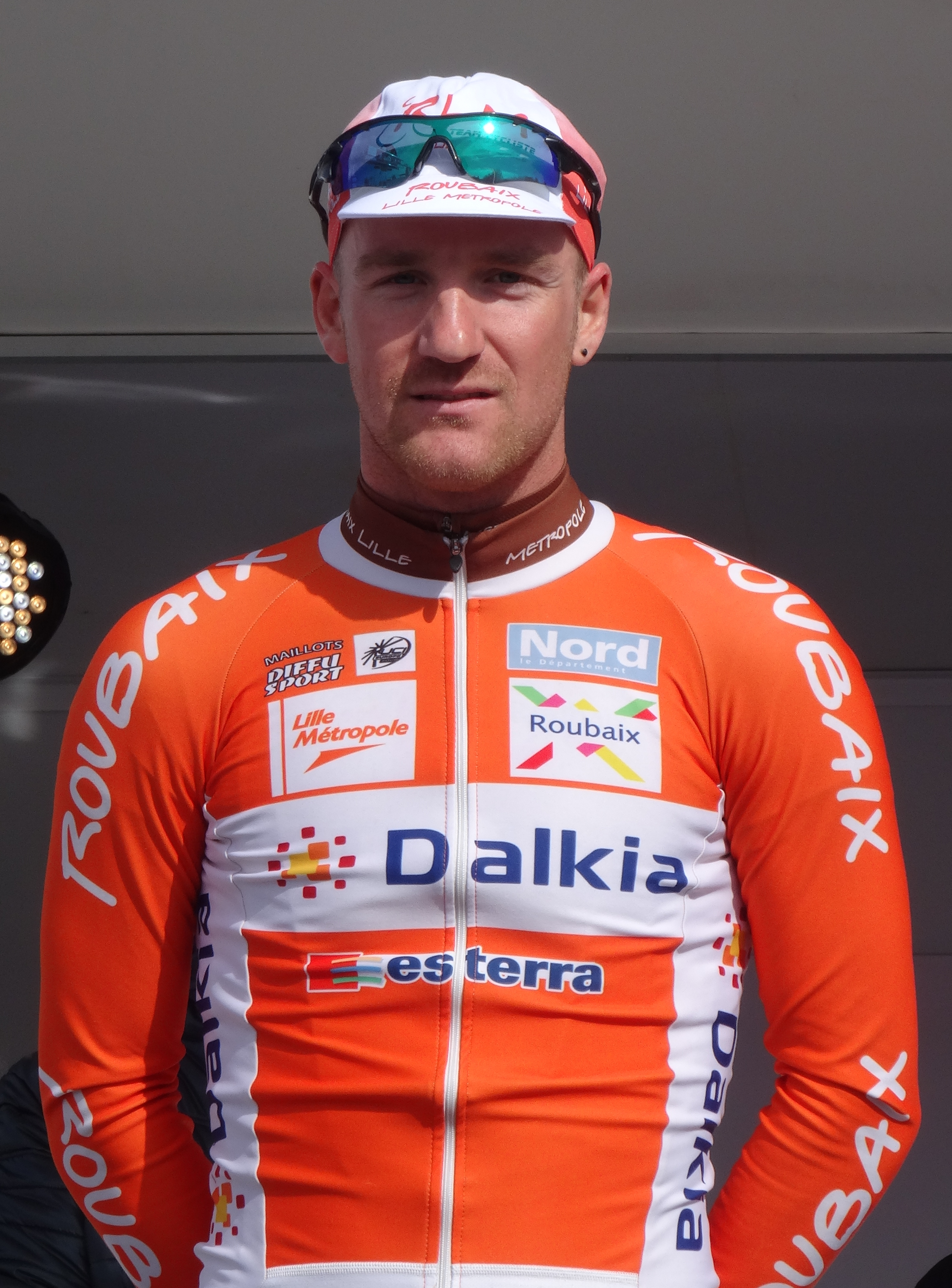 Reportage réalisé le jeudi 17 avril à l'occasion du départ et de l'arrivée du Grand Prix de Denain 2014 à Denain, Nord, Nord-Pas-de-Calais, France.